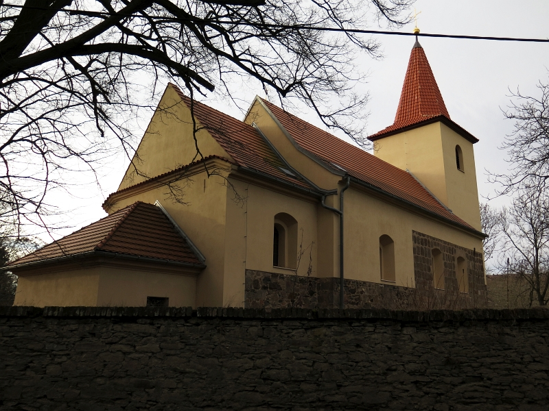 Kostel Narození Panny Marie, náves, Olešky.